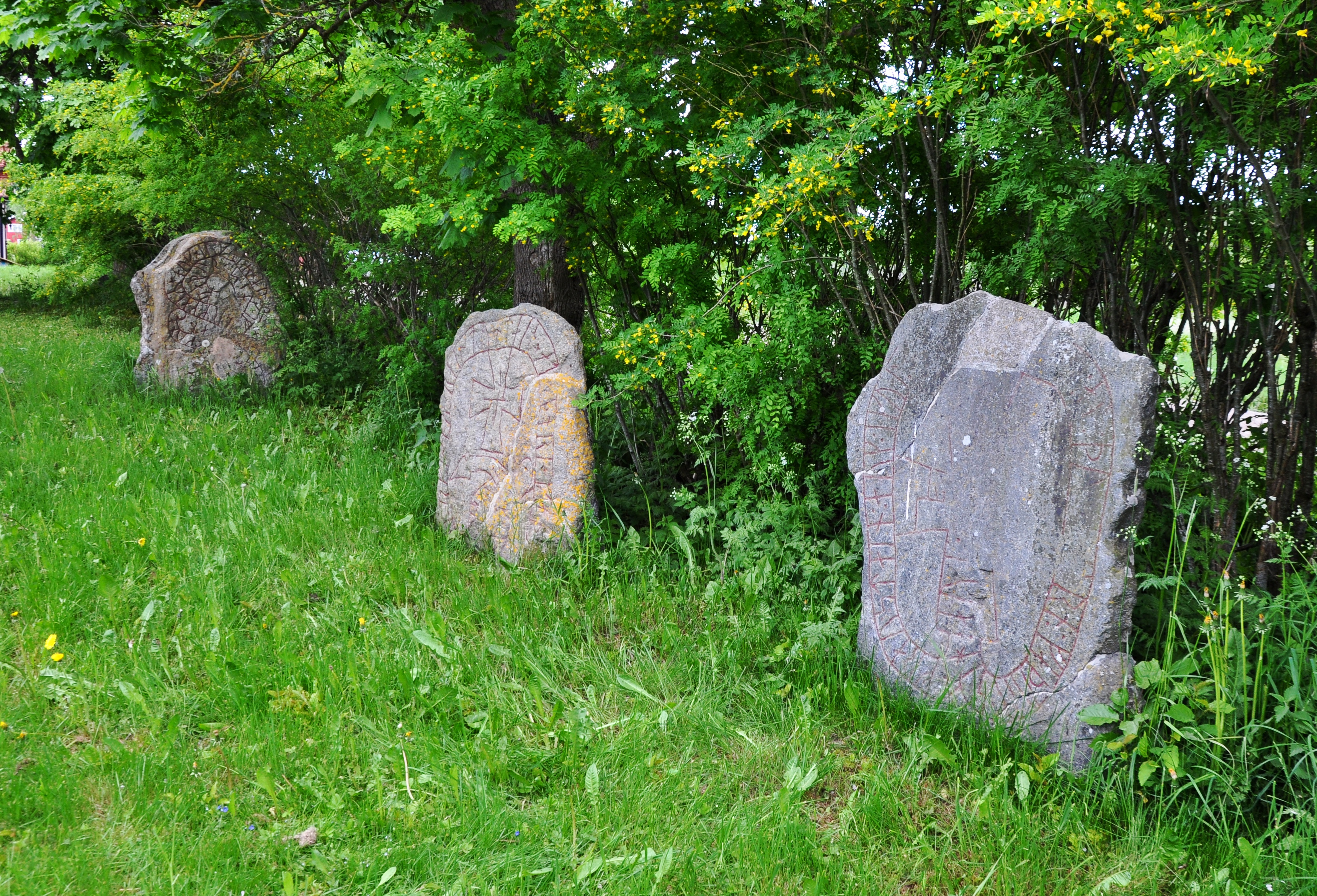 Runstenar Sö 232 (t.h.), 233 (mitten) och 234 (t.v.) i byn Trollsta i Sorunda socken, Södertörn.